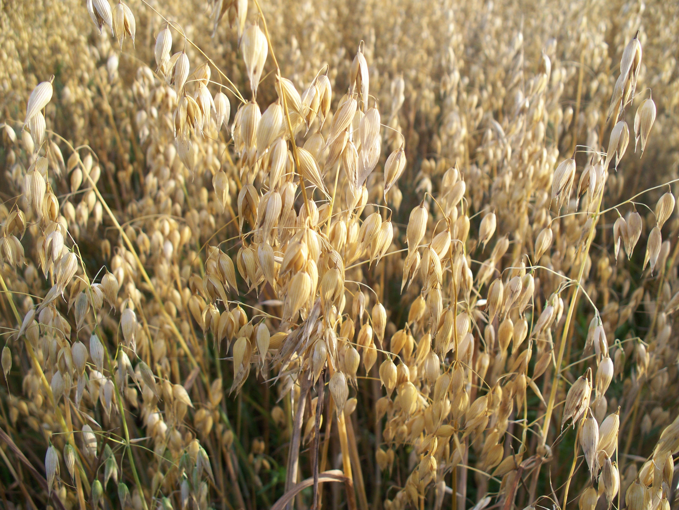 Owies uprawiany ekstensywnie